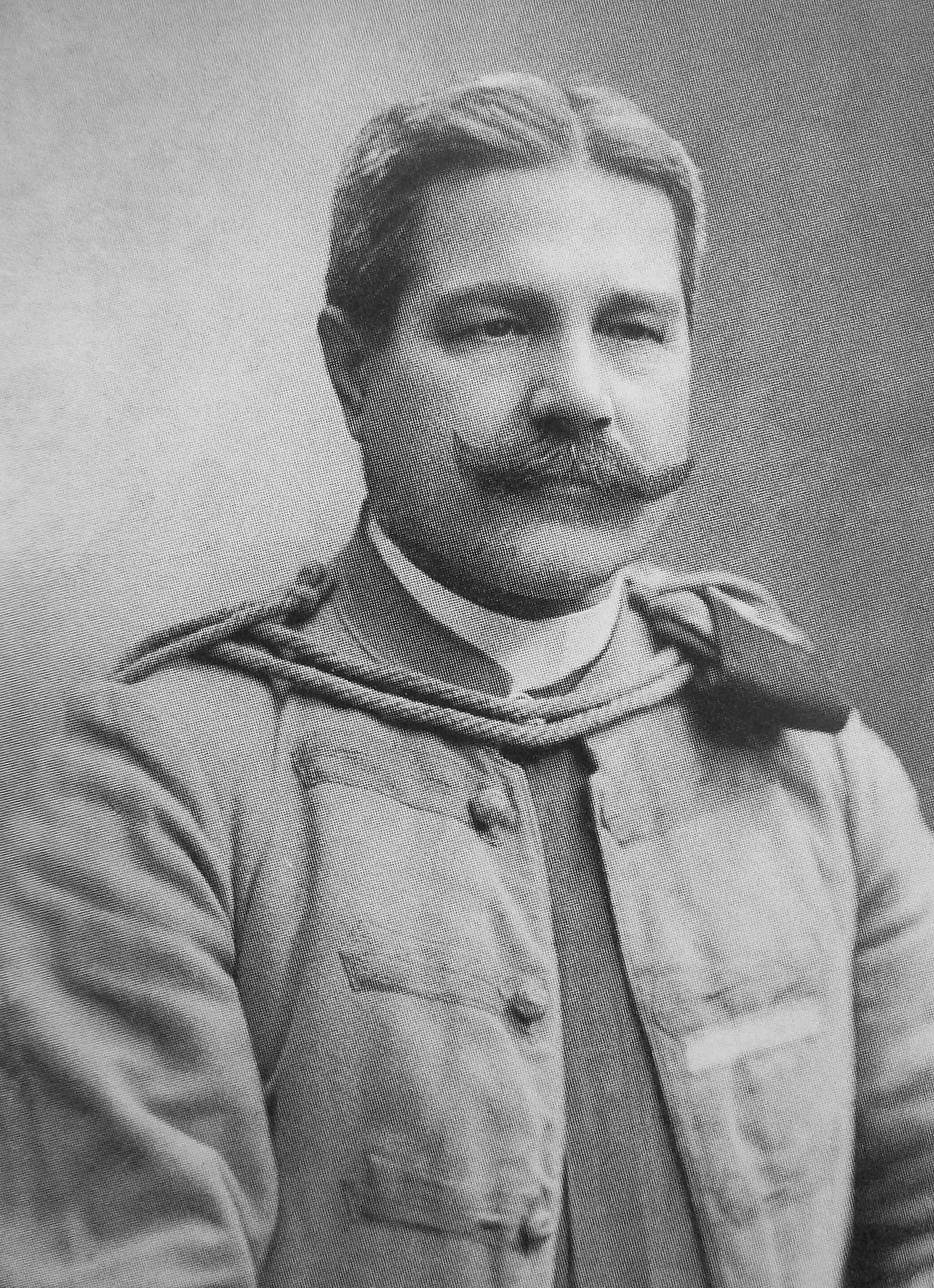 Adam Pytel (1856-1928)